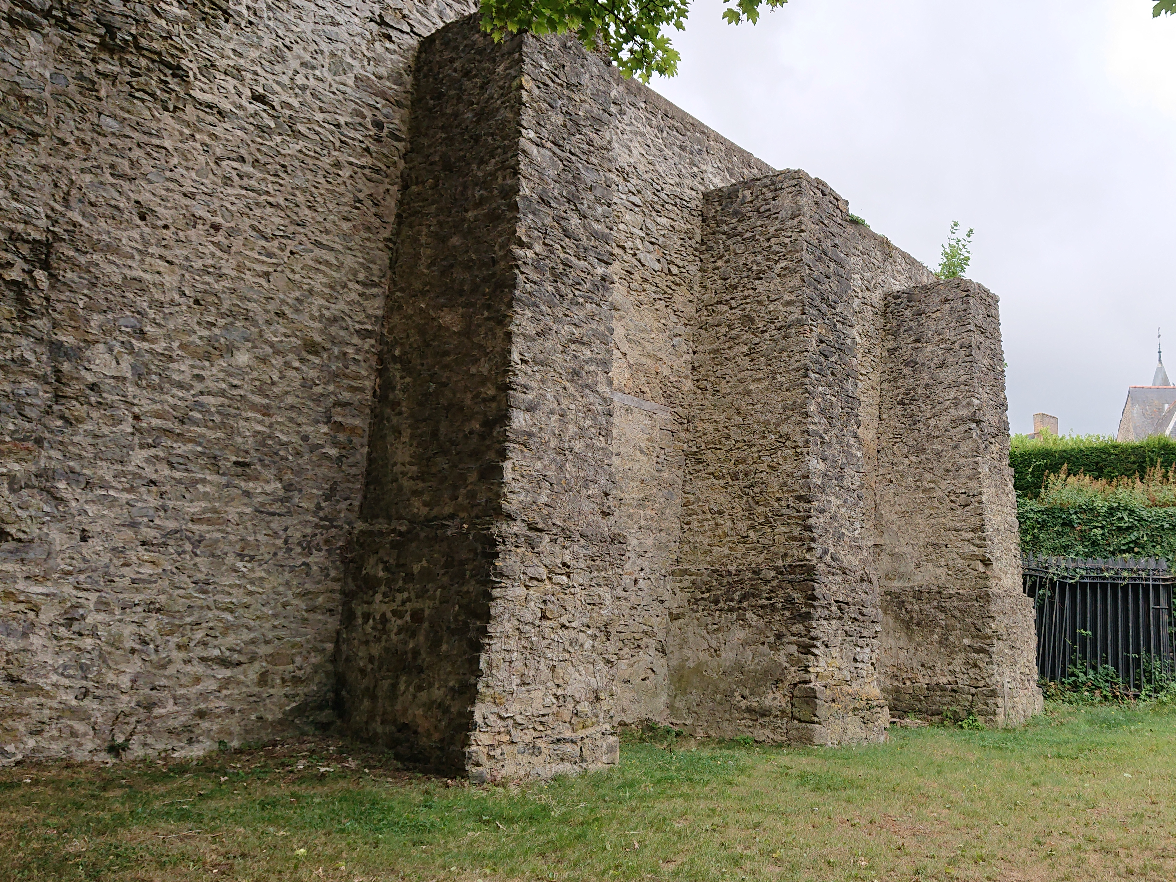 Rempart du Vieux-Château de Laval, France.